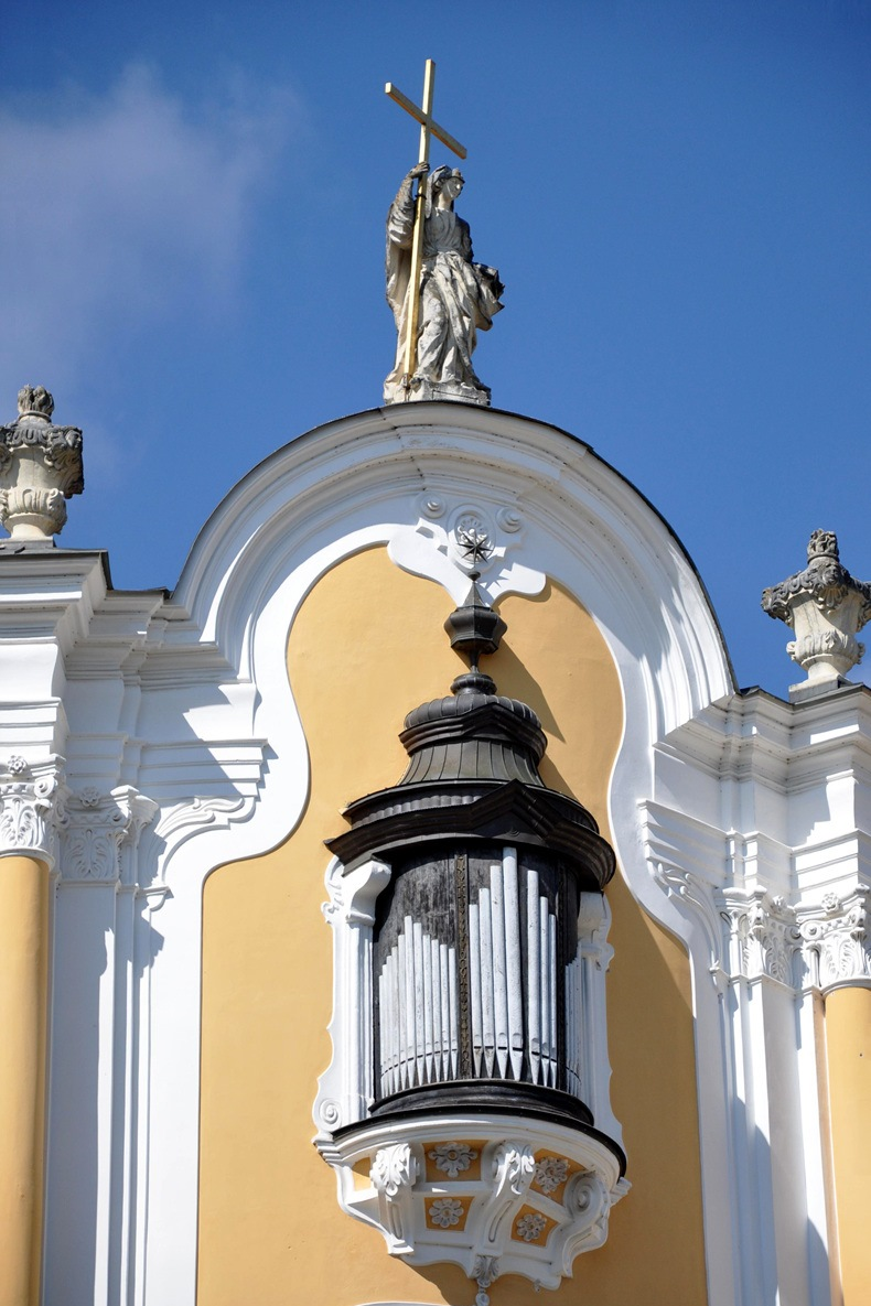 Das Hornwerk an der Aussenfassade der Stiftskirche von Rein